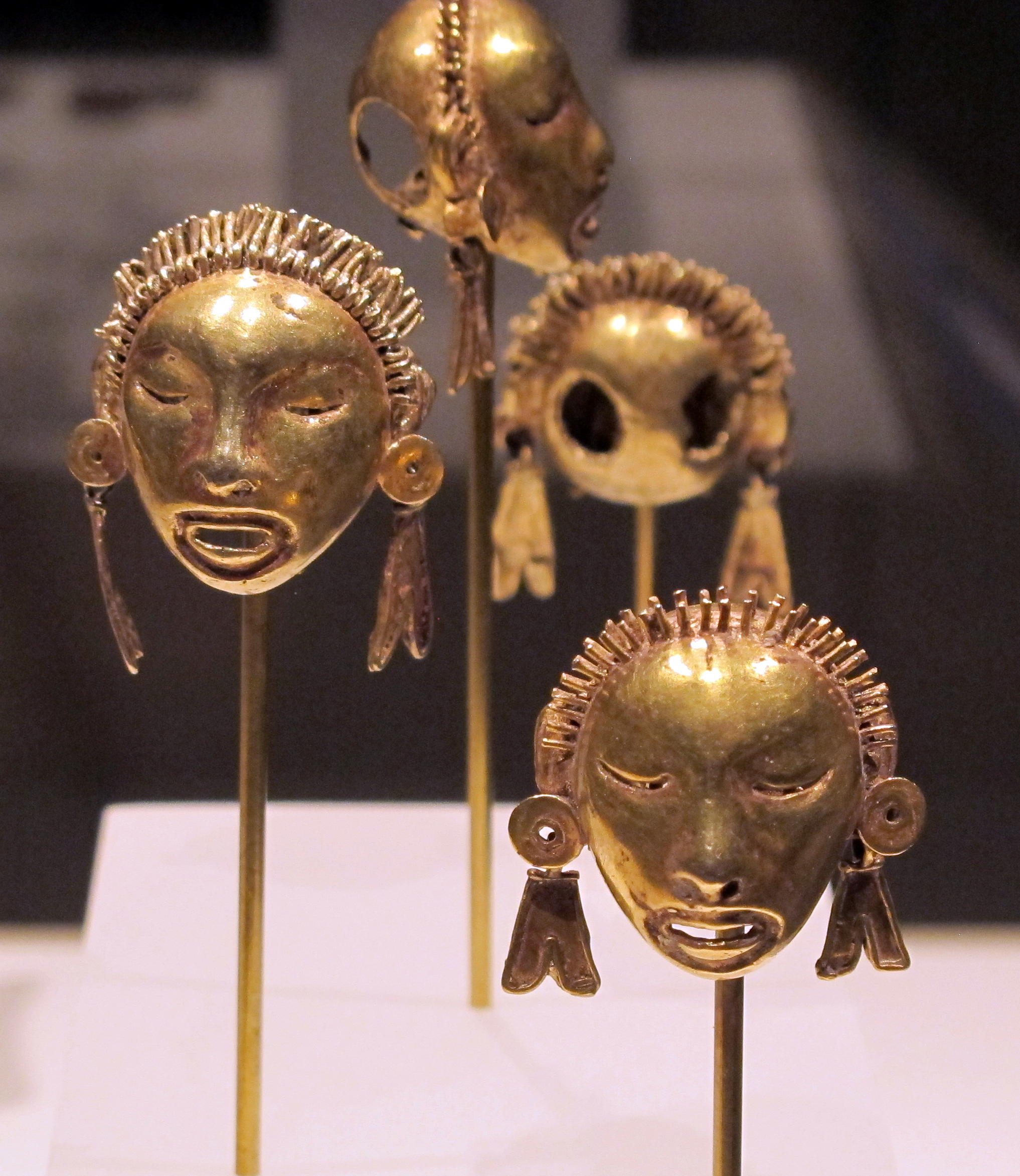 Pre-Columbian jewellery in the Metropolitan Museum of Art